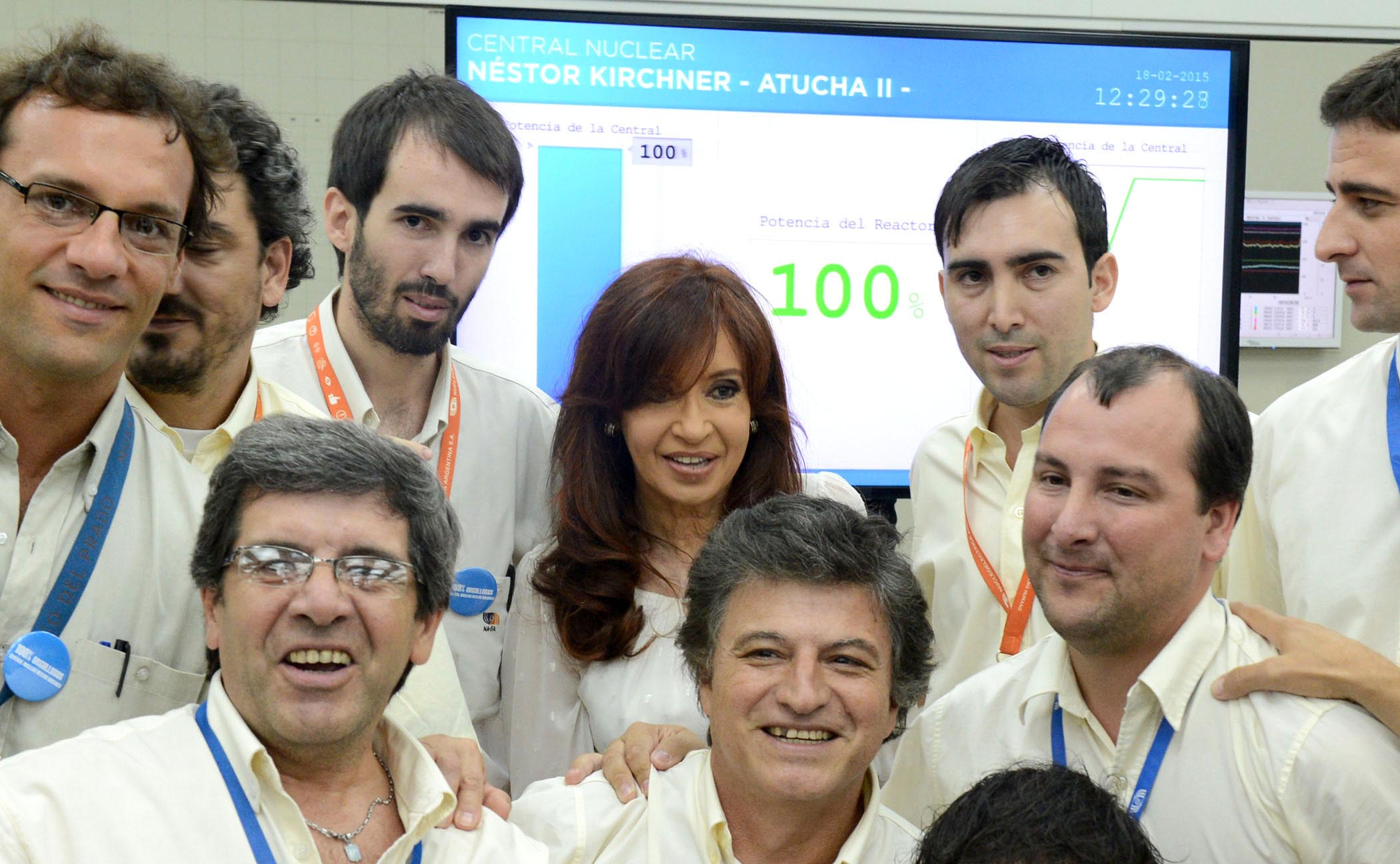 Puesta en funcionamiento al 100% de la central nuclear Néstor Kirchner-Atucha II